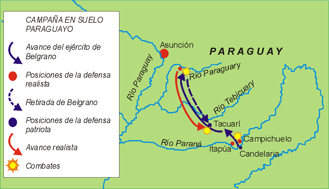 Campaña de Belgrano en suelo paraguayo (1811)